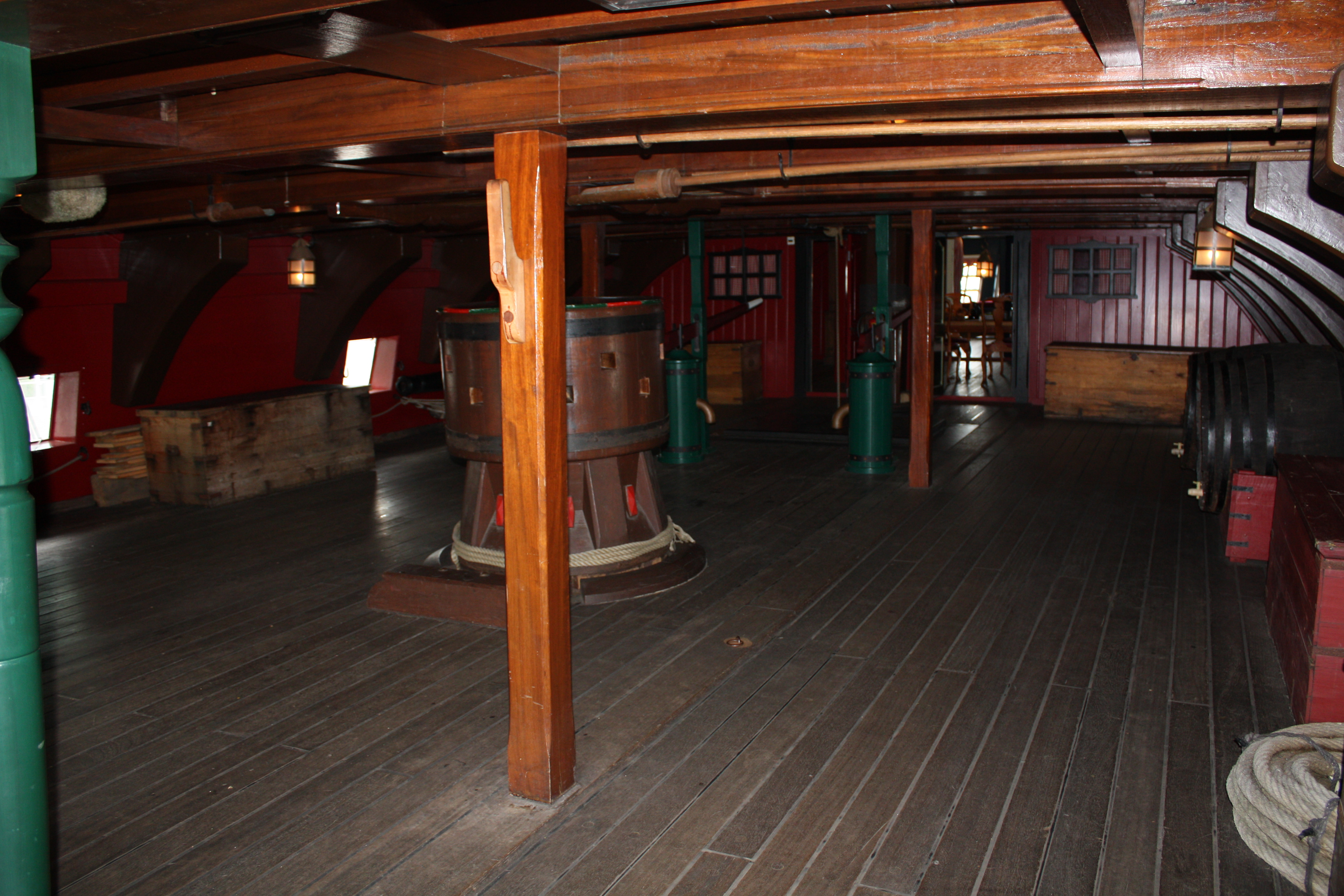 VOC-Schiff Amsterdam (Nachbau) im Amsterdamer Oosterdok - Decksansicht